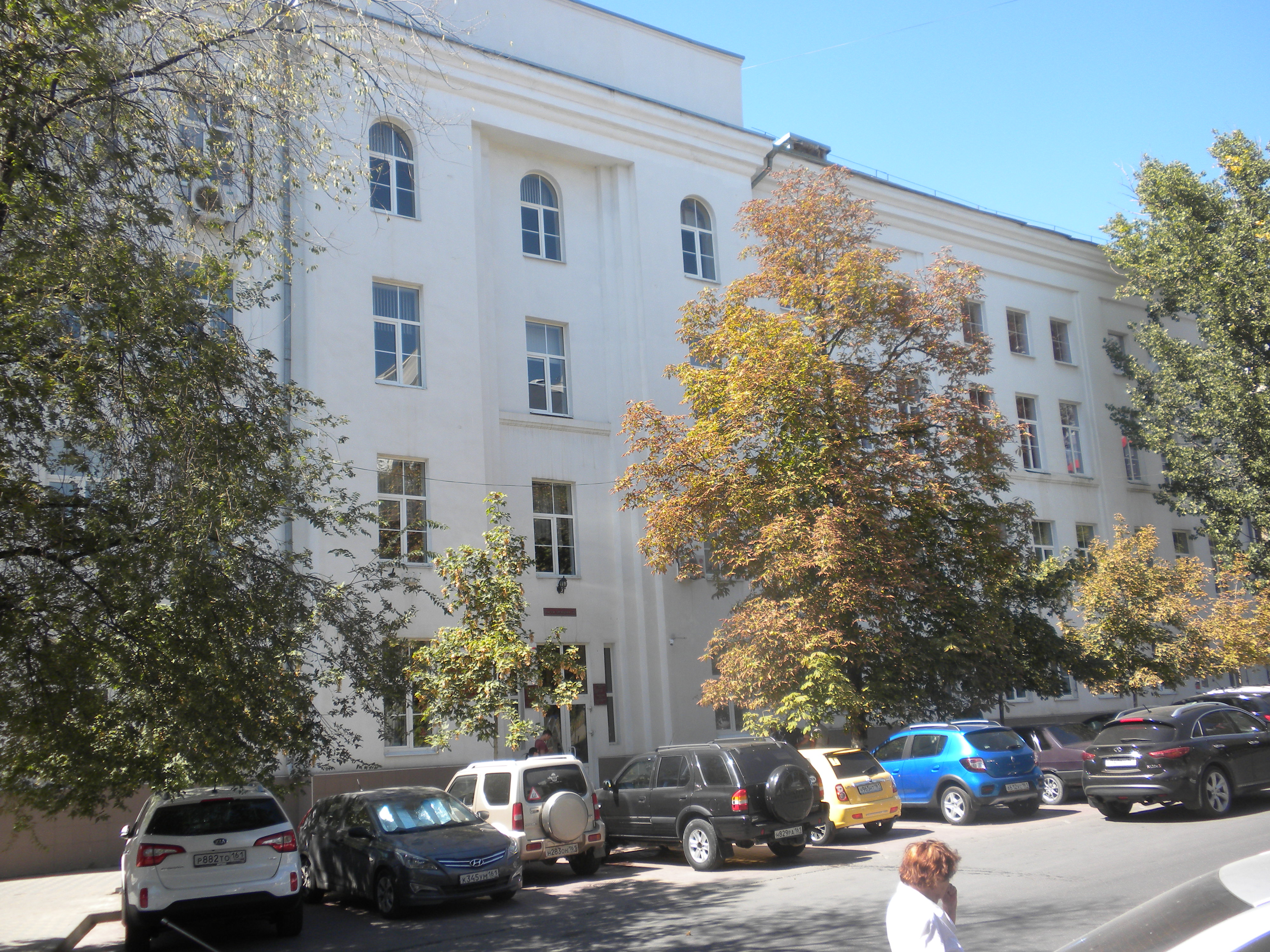 Здание Финансово-экономического колледжа в Ростове-на-Дону: пер. Доломановский, 53.